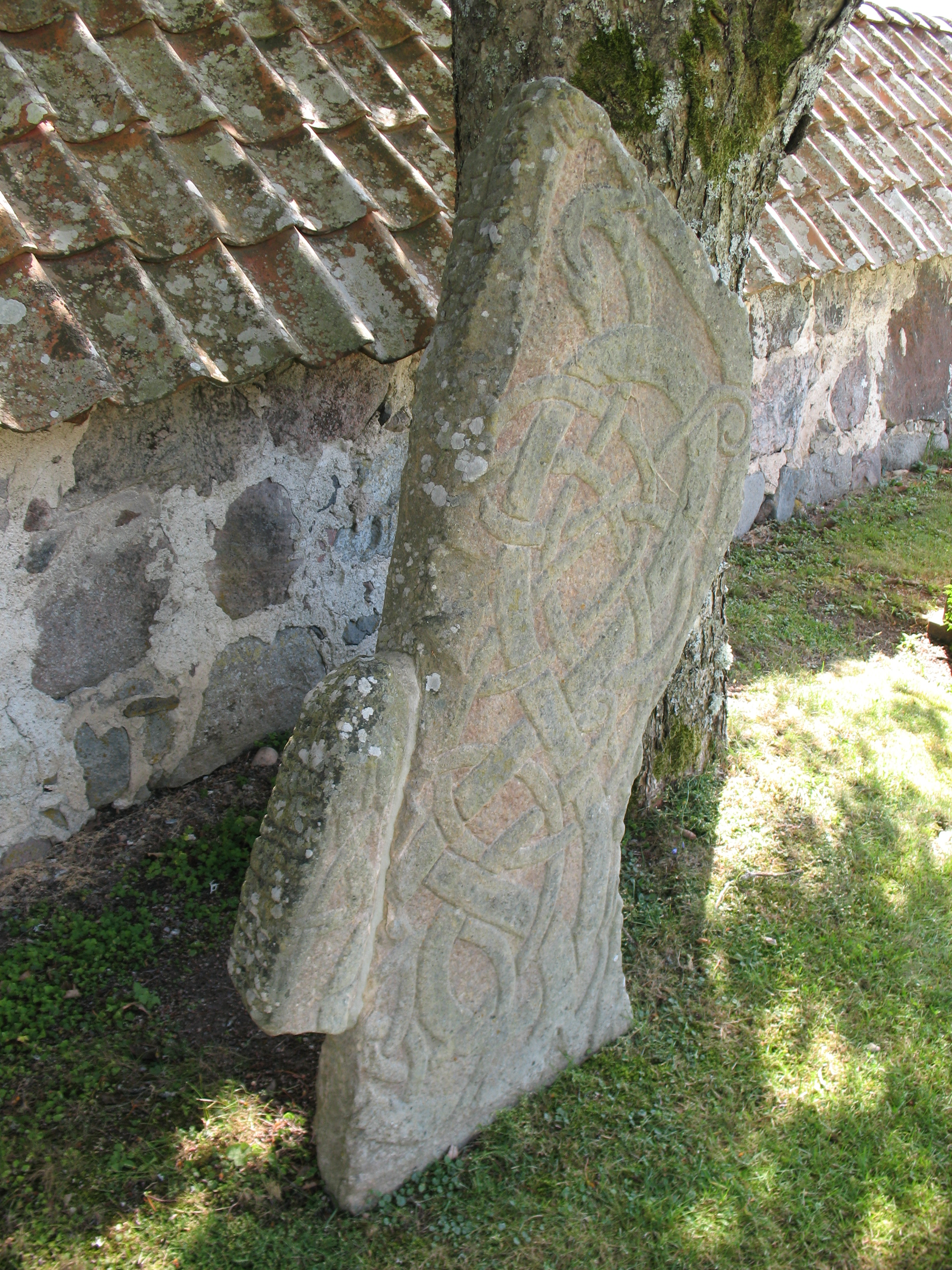 a runestone